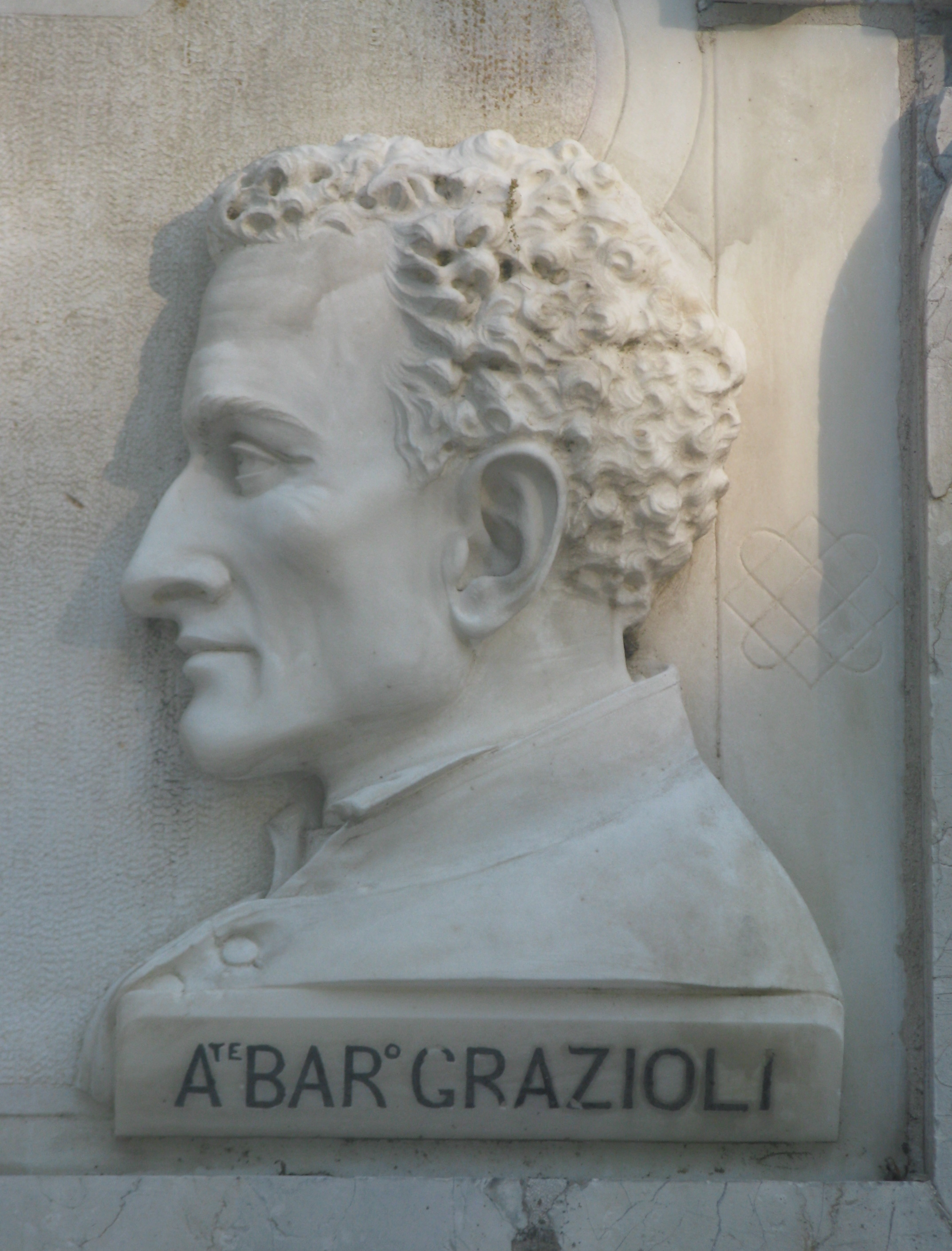 Bartolomeo Grazioli raffigurato nel monumento ai Martiri di Belfiore